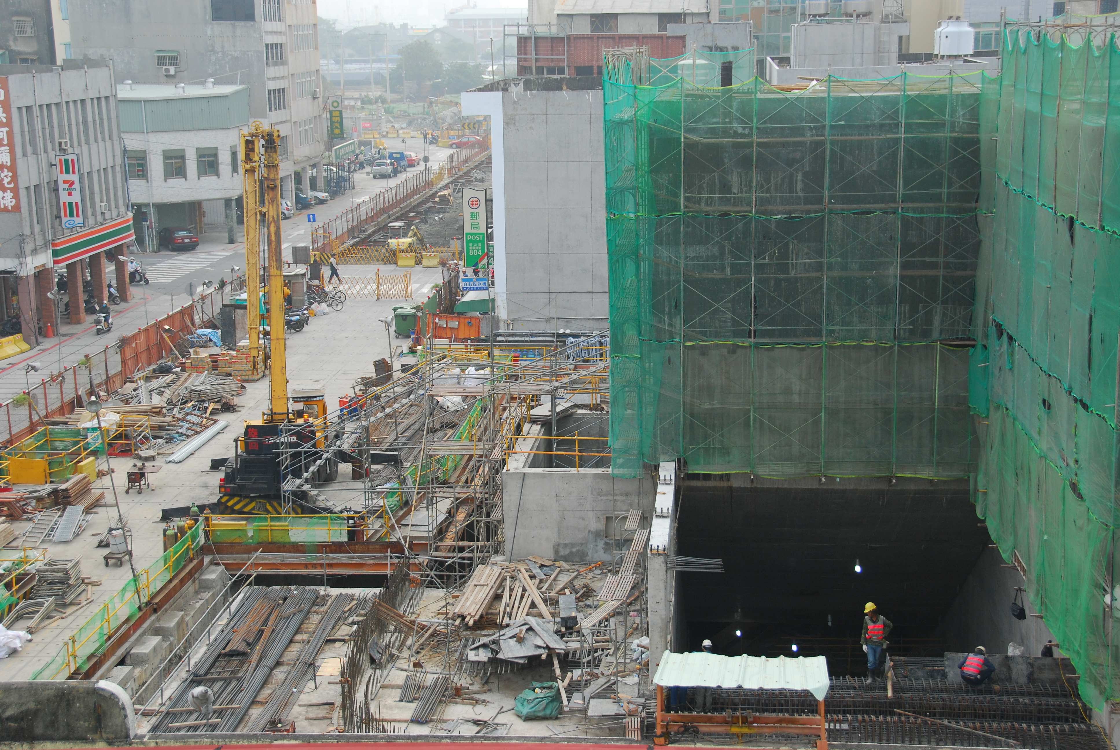 施工中的高雄捷運橘線西子灣站。